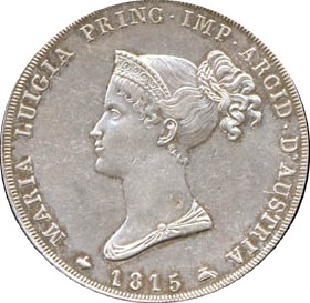 Moneta del Ducato di Parma Piacenza e Guastalla